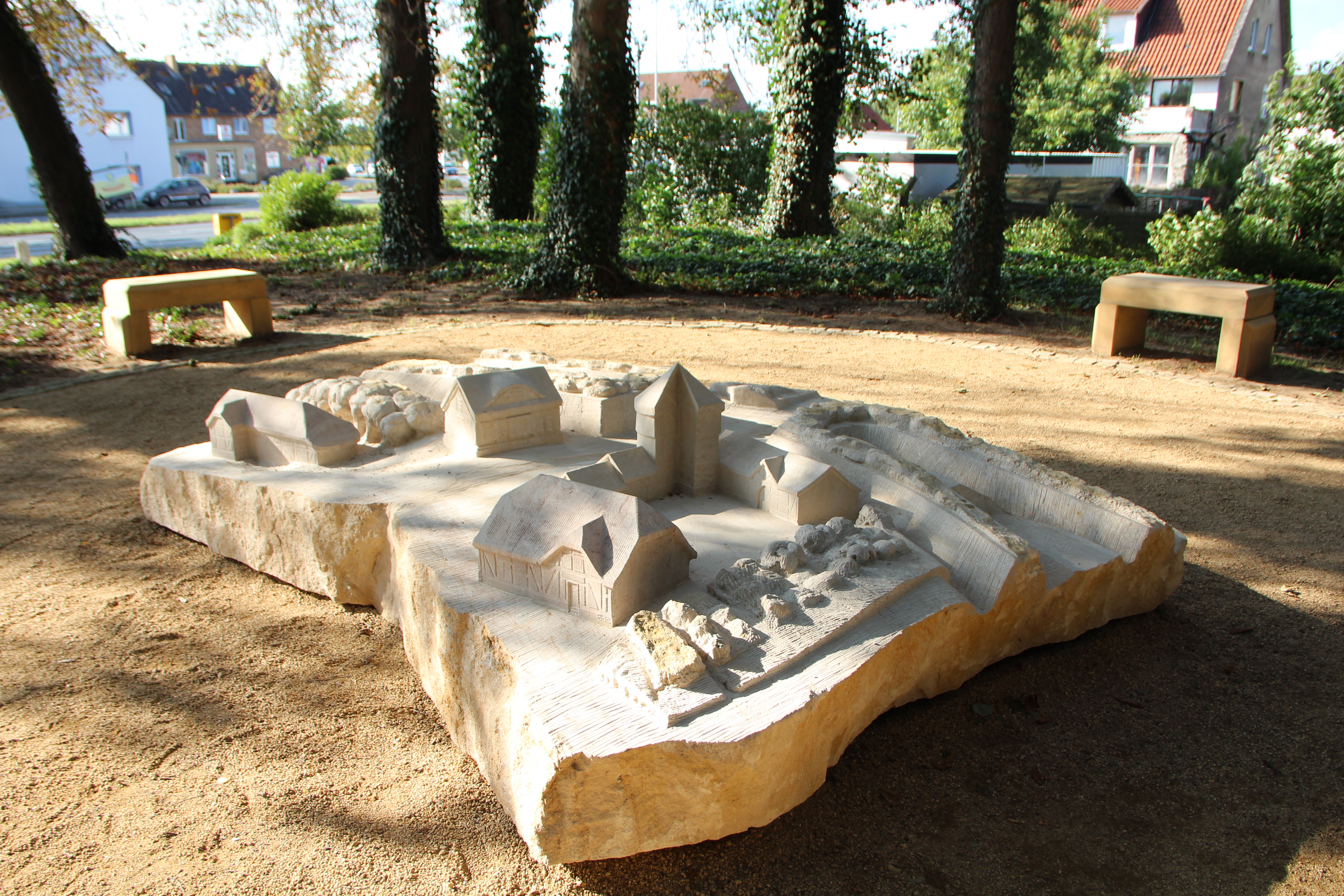 2x3 Meter großes Denkmal im Maßstab 1:50 in Erinnerung an die mittelalterliche Landwehr in Braunschweig am Wendenturm